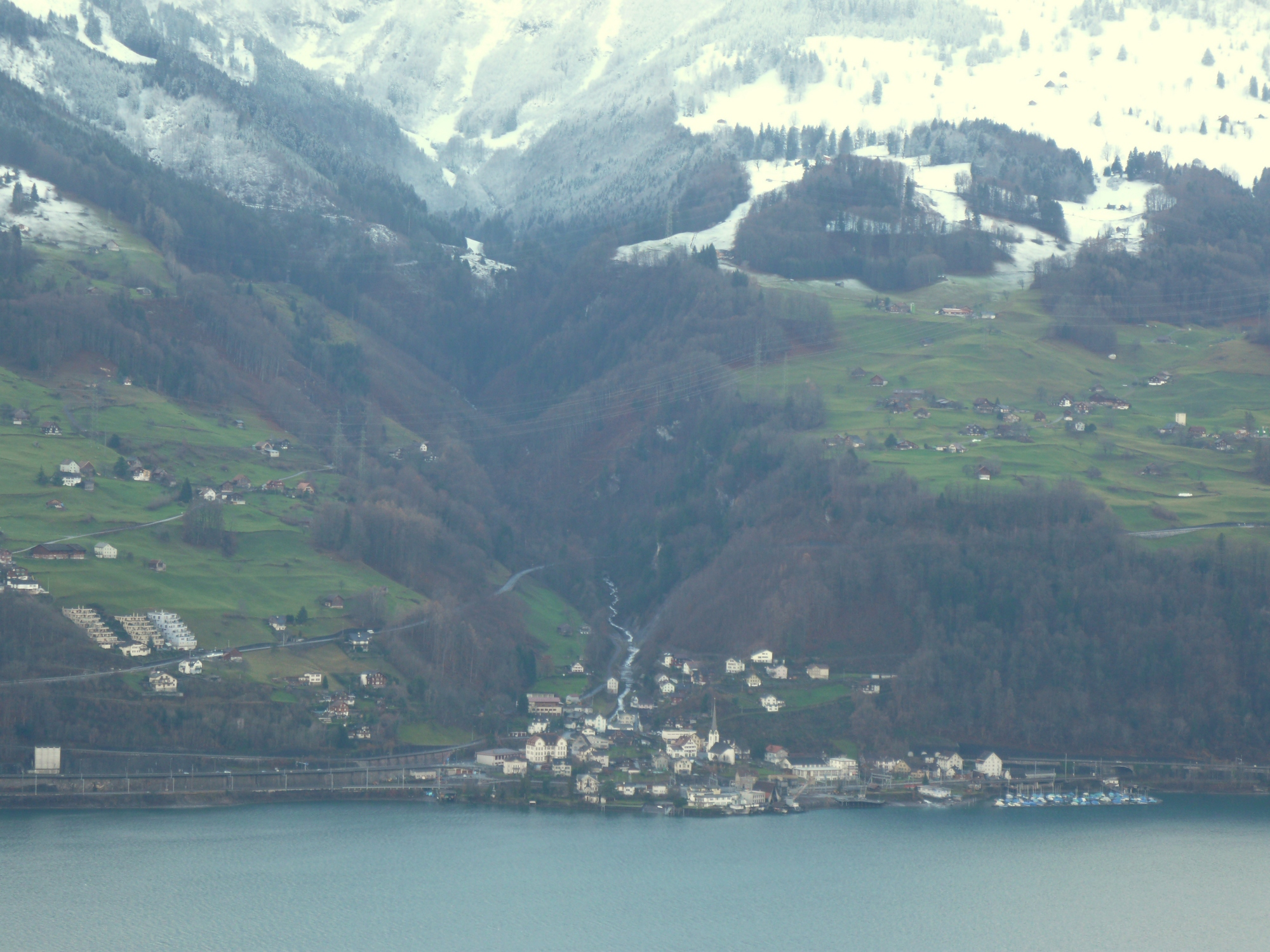 Muehlehorn, Switzerland